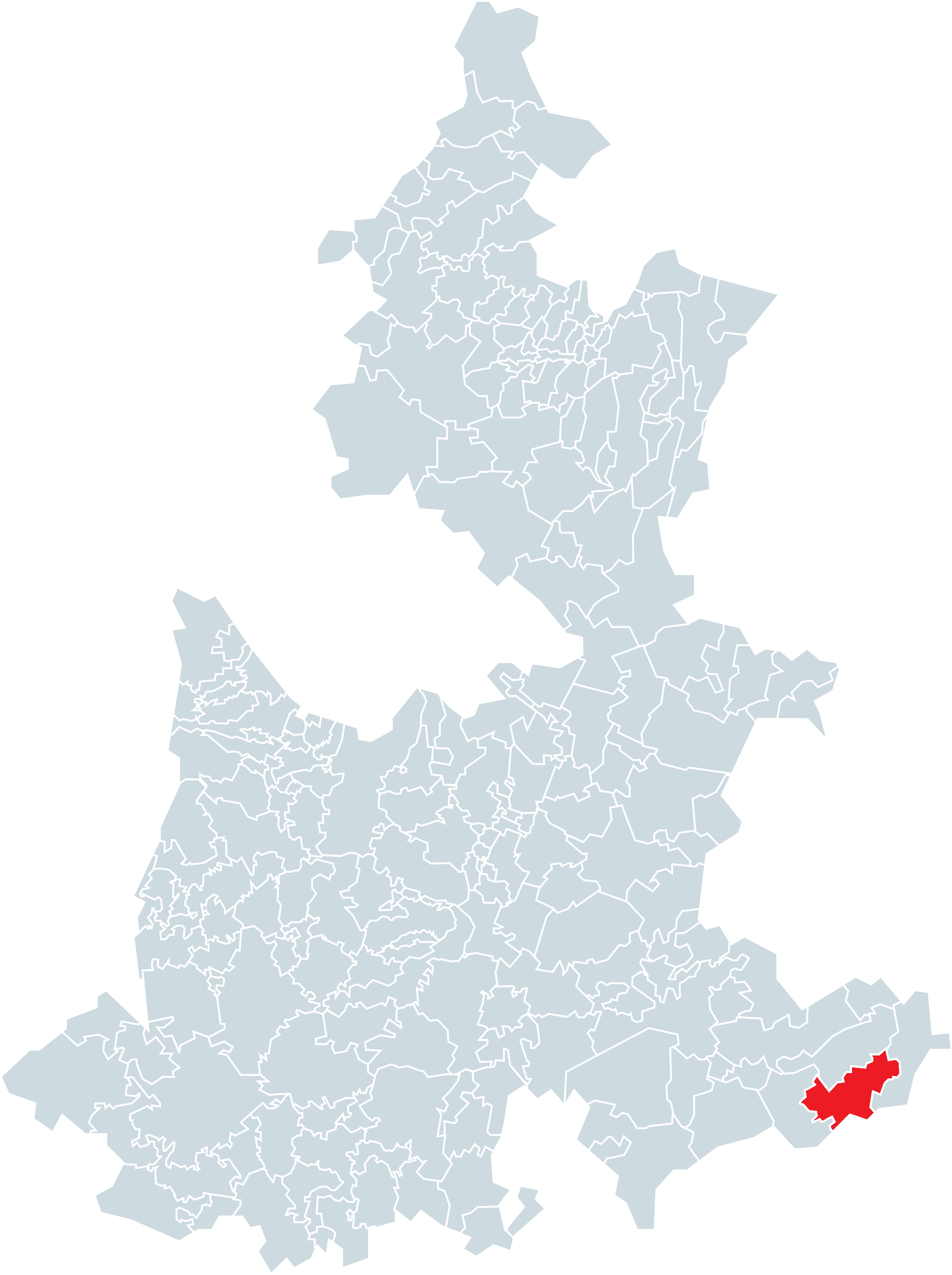 Municipio de Coyomeapan